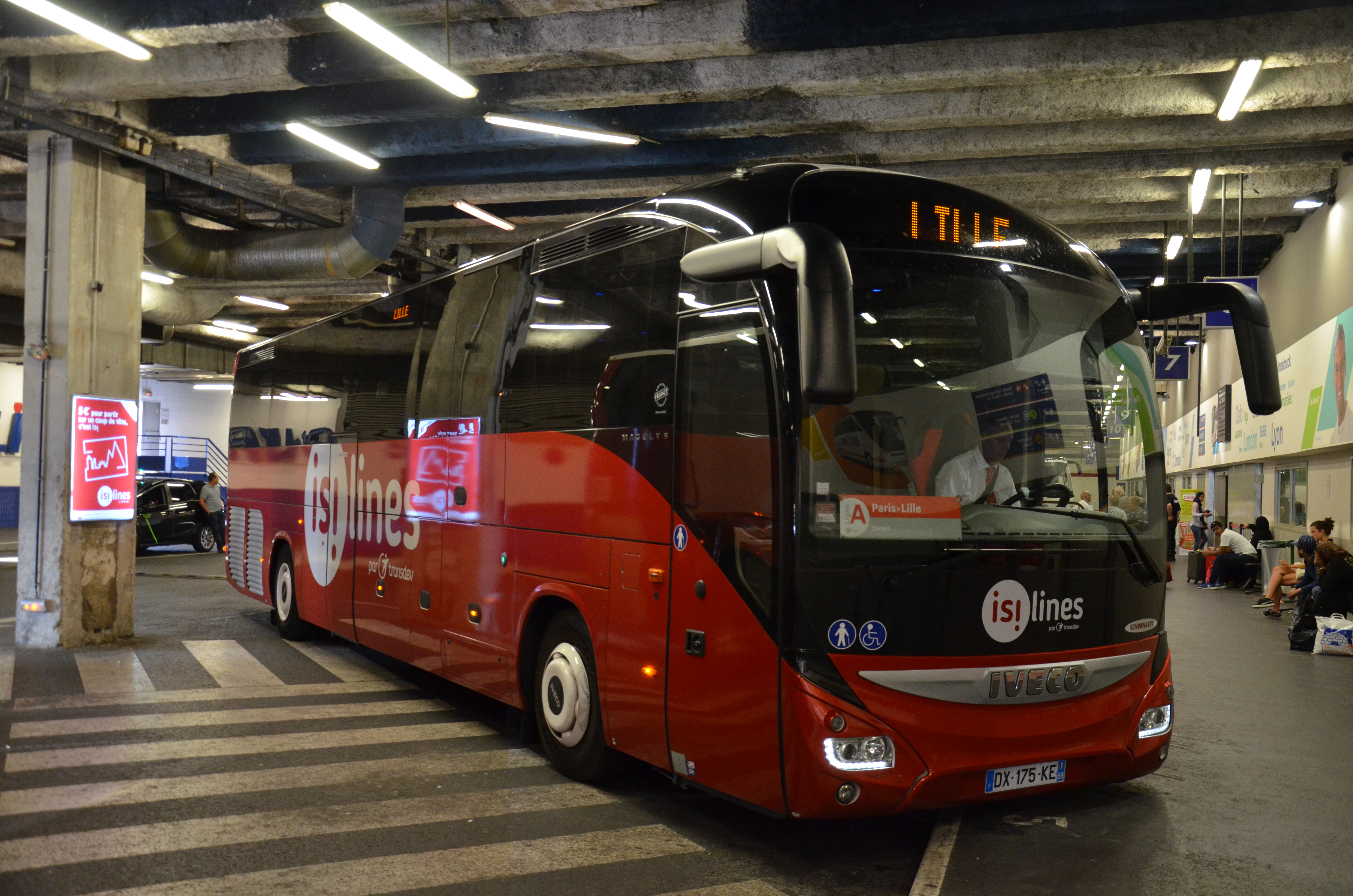 Isilines Iveco Magelys en gare routière internationale de Paris Gallieni.